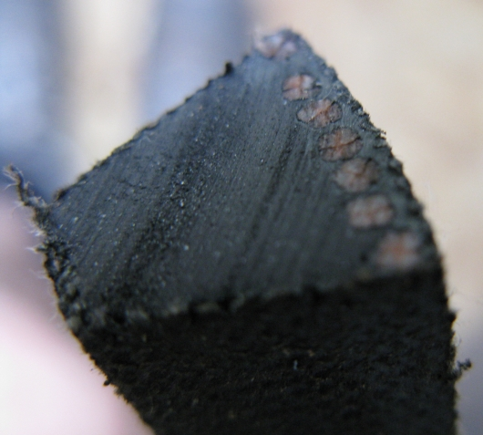 photo de coupe d'une courroie trapèzoïdale.